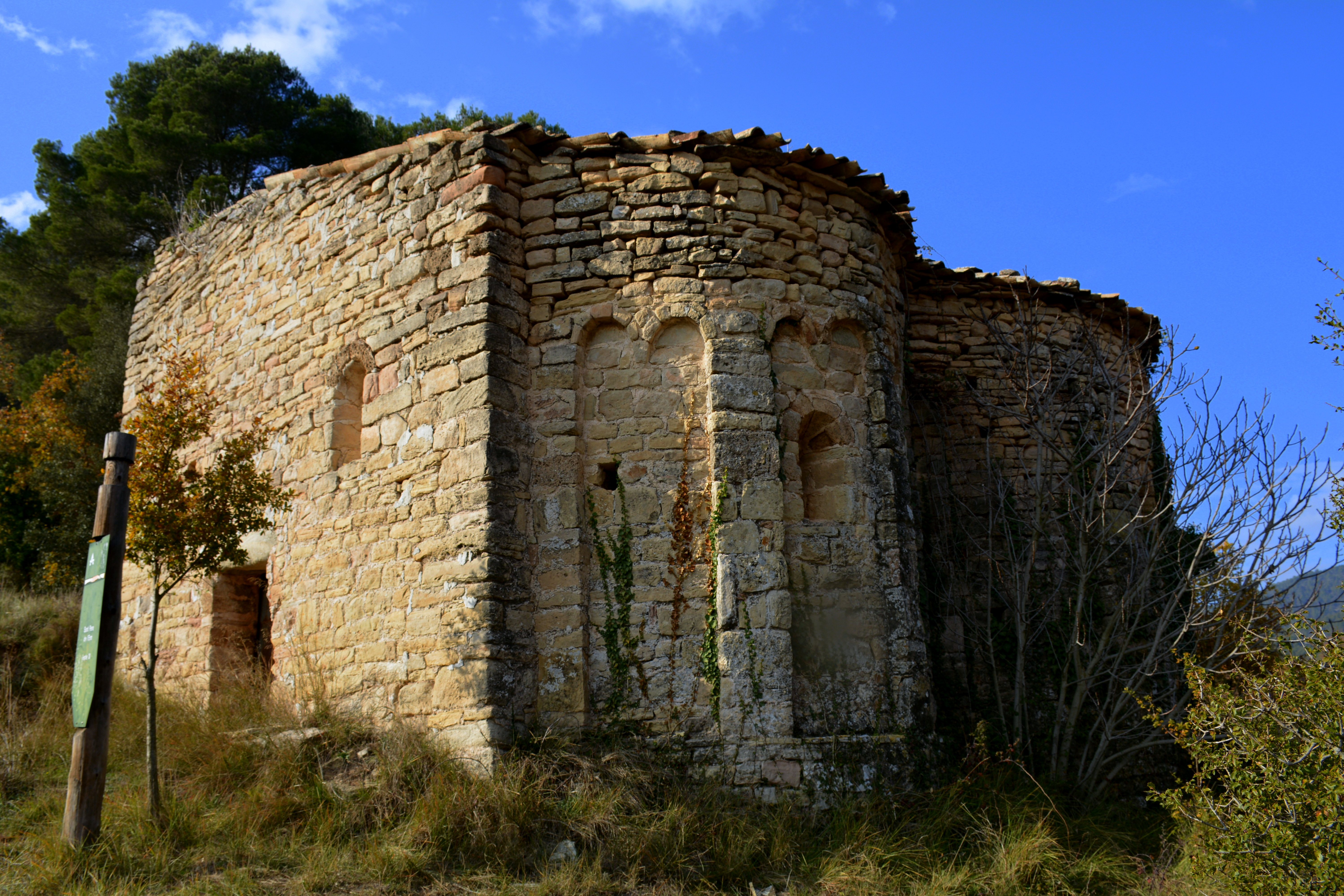 Sant Pere de l'Erm: Està situada enmig de camps de conreu. Sembla que va ser construïda a començament del segle XI per vertebrar un nucli de poblament que no va arribar a existir.